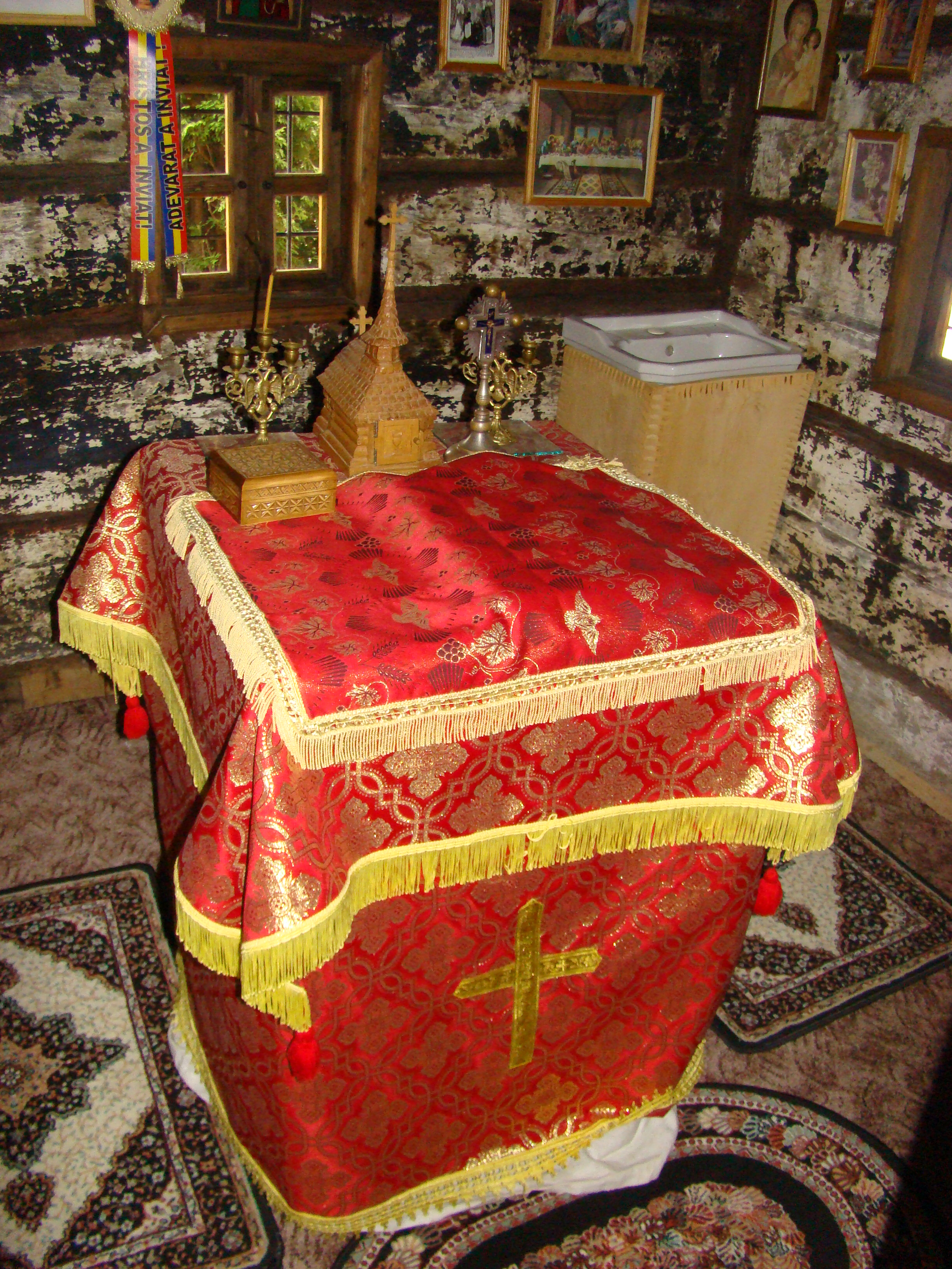 Biserica de lemn "Adormirea Maicii Domnului" a mănăstirii Bic, strămutată din satul Stâna